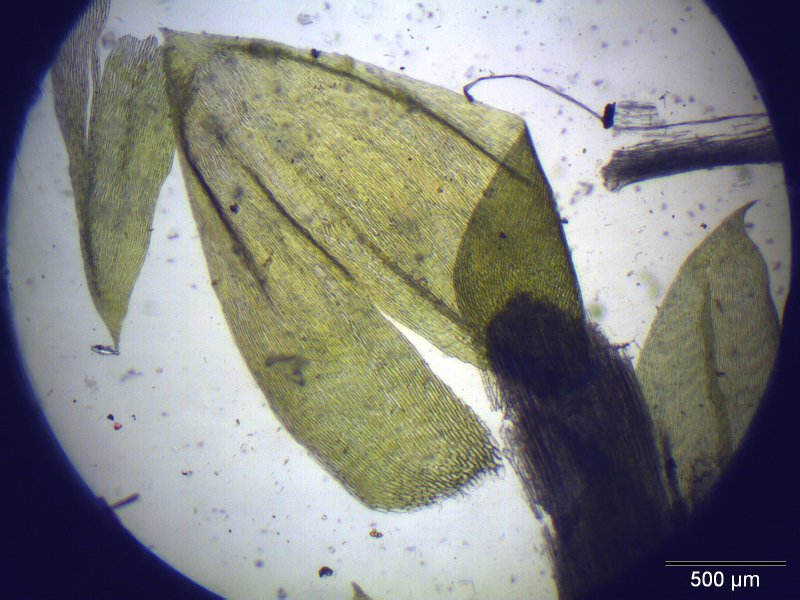 Mauer-Schnabeldeckenmoos (Rhynchostegium murale), Blatt, Vergrößerung: 40x